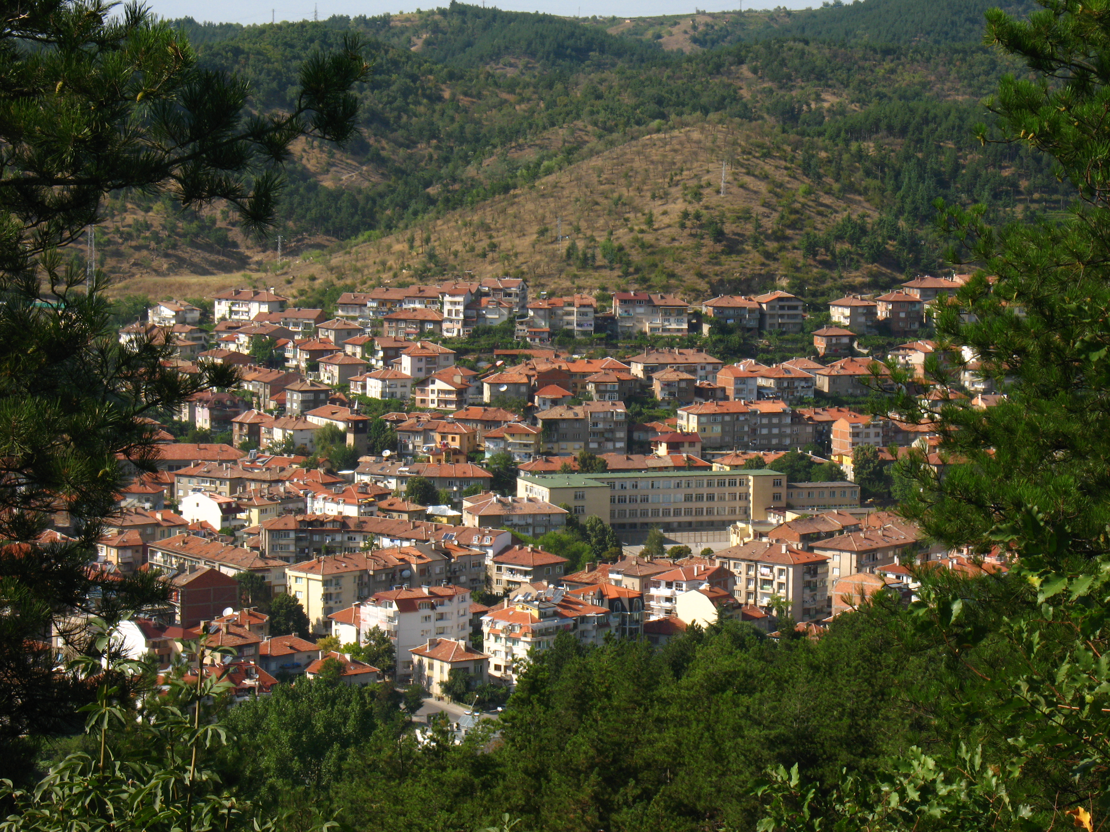 Панорама на Благоевград.